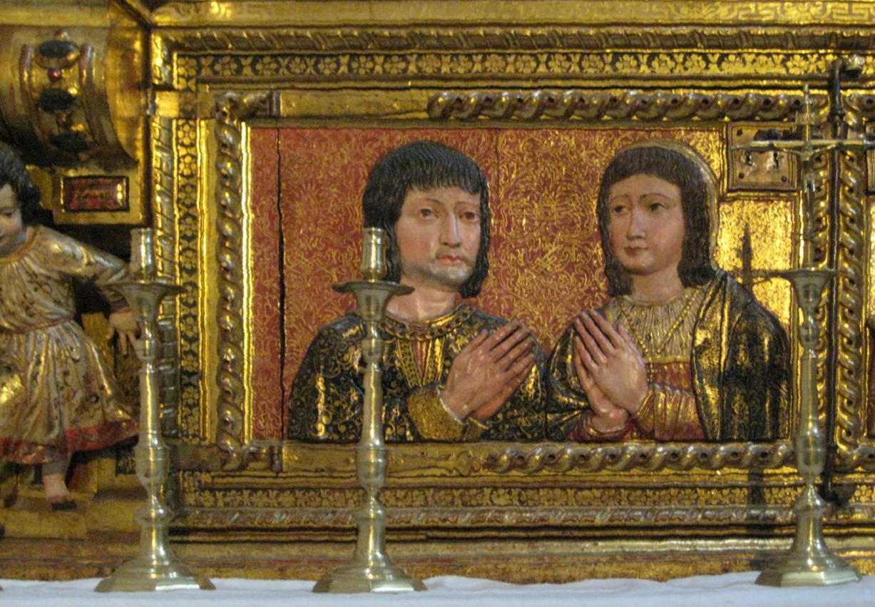 Reliquary altar, left. Sculptor Alonso de Mena 1632. Capilla Real, Granada